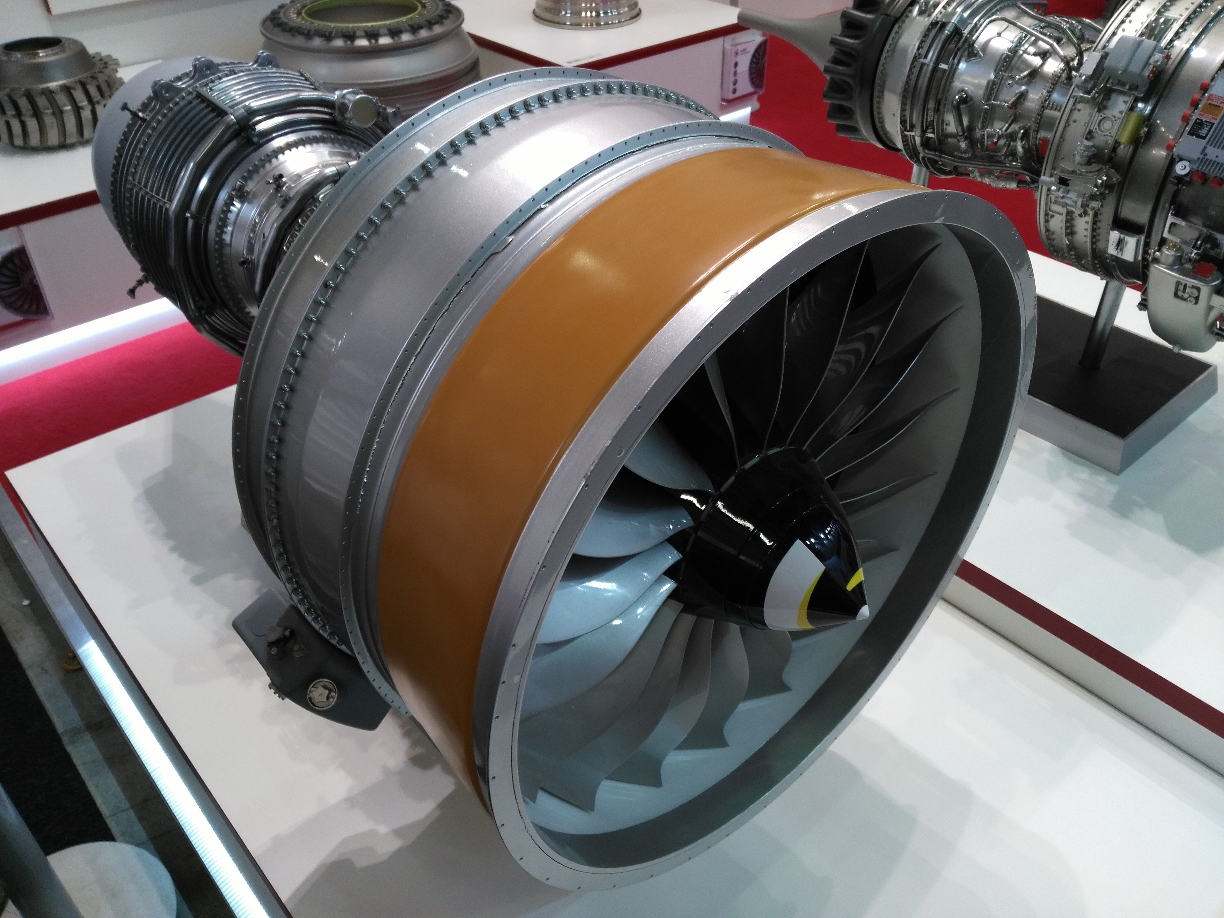 Paris Air Show 2017 Aviadvigatel PD-14